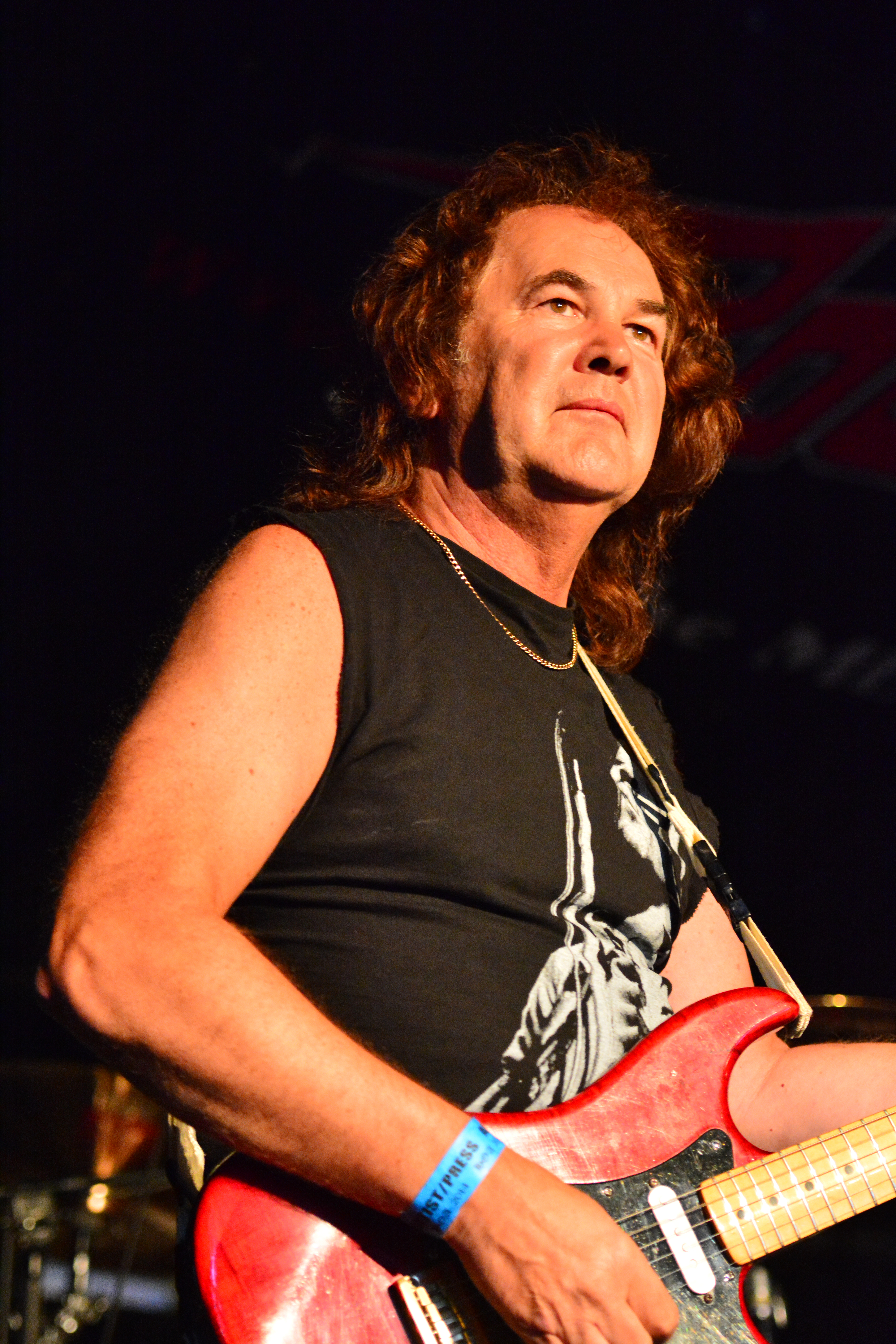 Graham Oliver von Saxon bzw. Oliver/Dawson Saxon beim Headbangers Open Air 2014